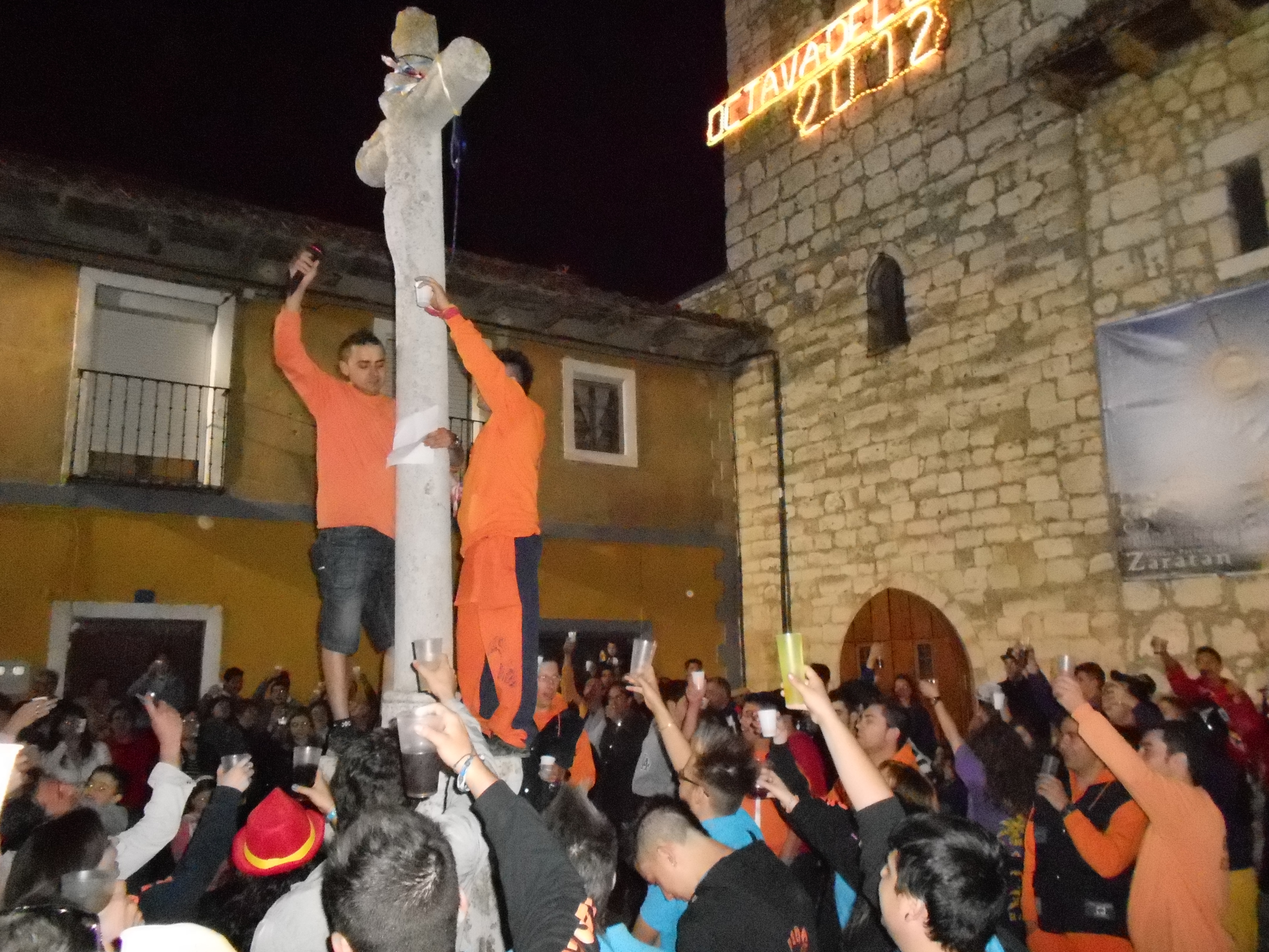 Brindis que las peñas de Zaratán, realizan durante las ocho noches de las fiestas, para festejar la Octava del Corpus Christi. Se reúnen en el crucero de la iglesia para brindar y cuelgan una cinta de distinto color.